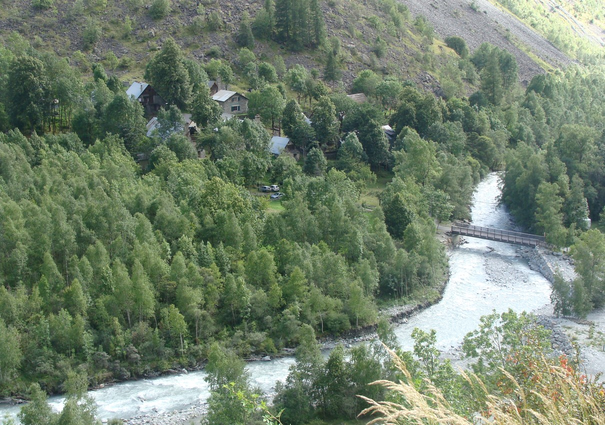 La Séveraisse et le hameau du Bourg (commune de la Chapelle-en-Valgaudémar).